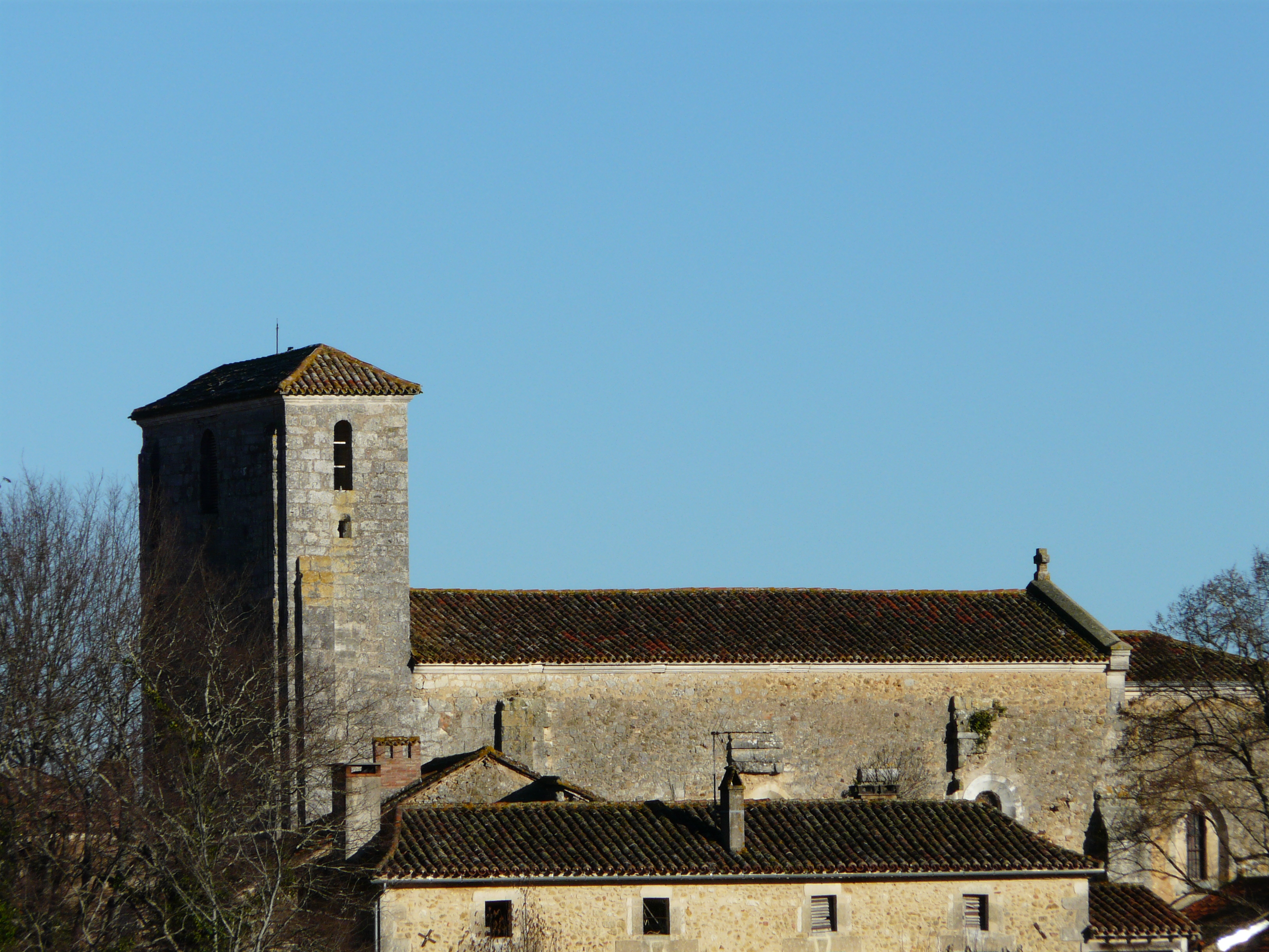 L'église Saint-Maxime de Saint-Maime-de-Péreyrol, Dordogne, France.